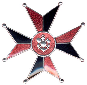 Odznaka